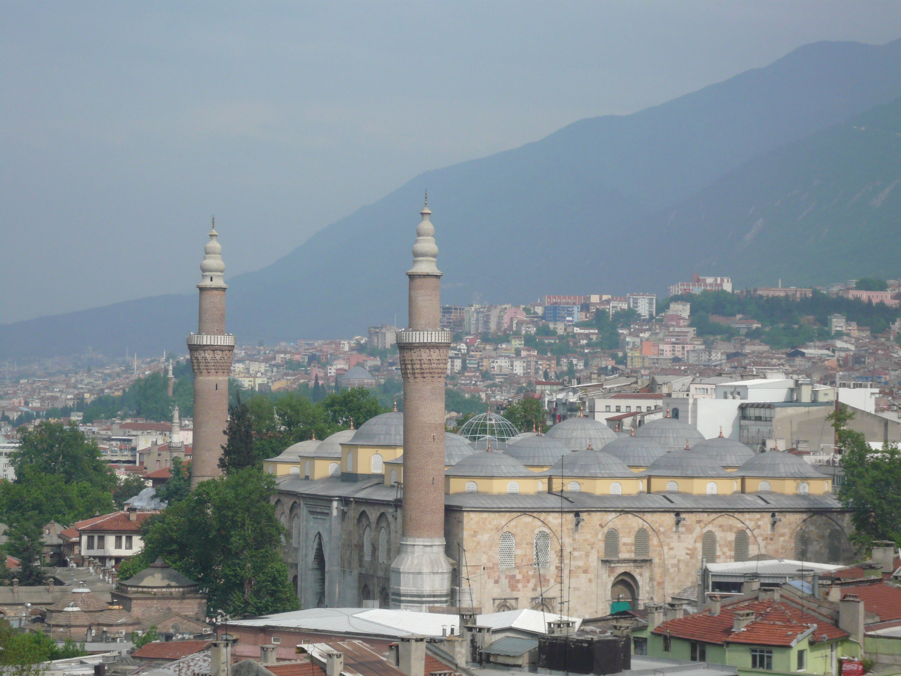 Bursa, la Grande Moschea